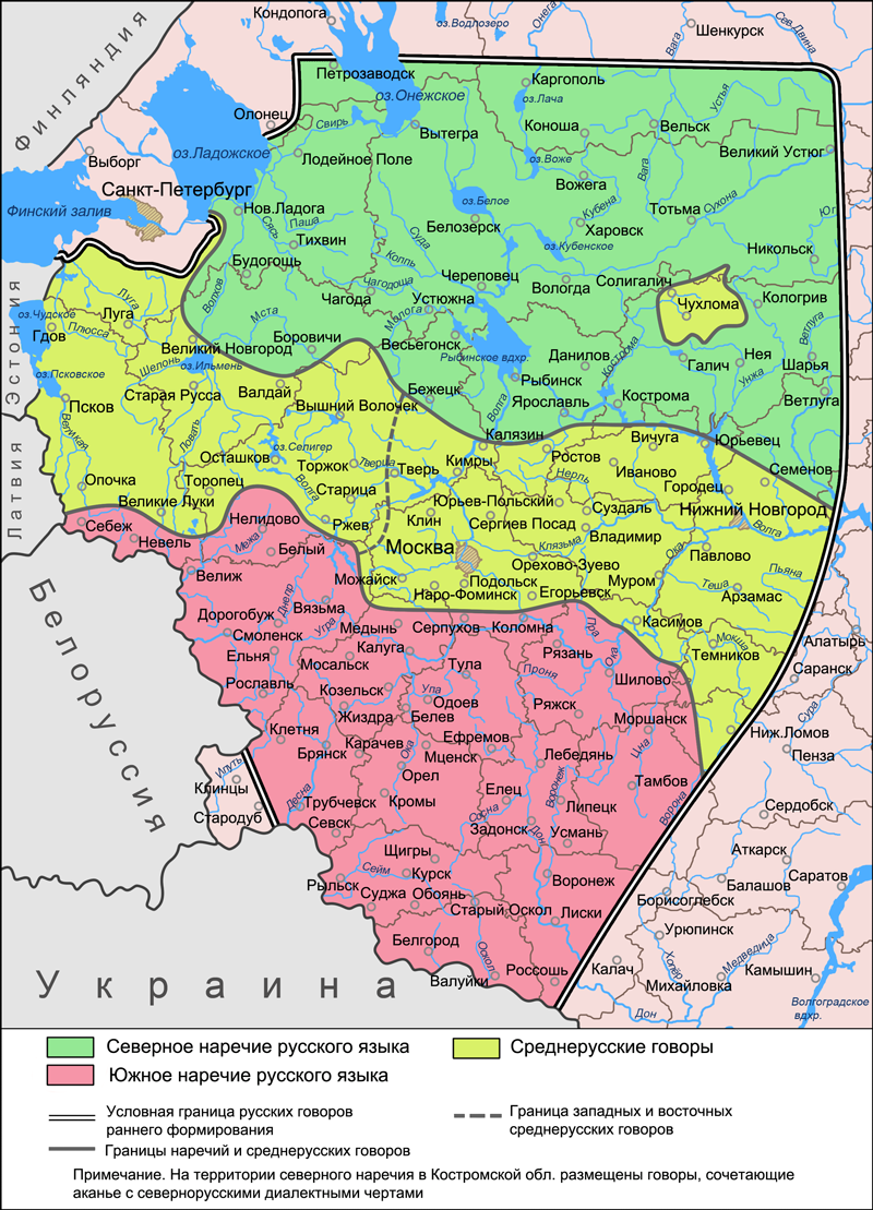 Карта наречий и среднерусских говоров (по диалектологической карте 1965 года) Источники: Захарова К. Ф., Орлова В. Г. Диалектное членение русского языка — 2-е изд. — М.: Едиториал УРСС, 2004. — ISBN 5-354-00917-0, с. 166. Язык русской деревни. Диалектологический атлас. — Наречия и диалектные зоны. Касаткин Л. Л. Русские диалекты. Лингвистическая география. // Русские. Монография Института этнологии и антропологии РАН. — М.: Наука, 1999. — с. 96